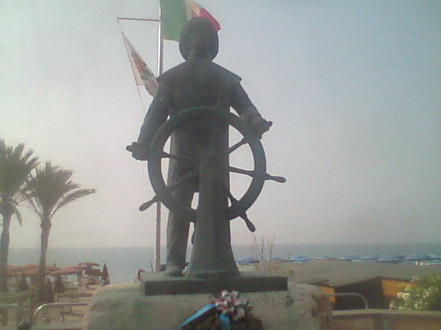 Monumento ai marinai d'italia (Finale Ligure)